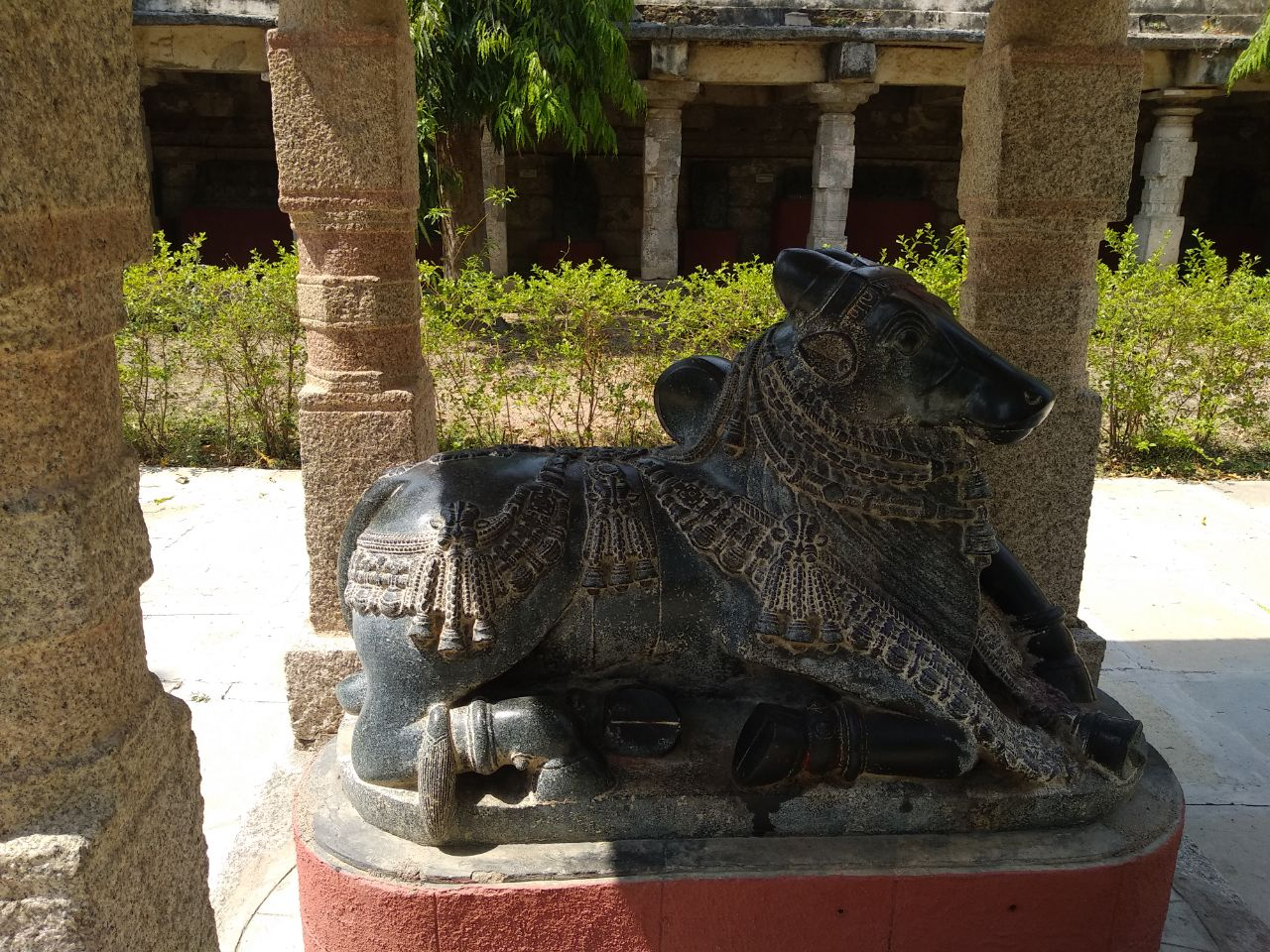 Nandi: కొలనుపాక పురావస్తు ప్రదర్శనశాలలోని నంది విగ్రహం.